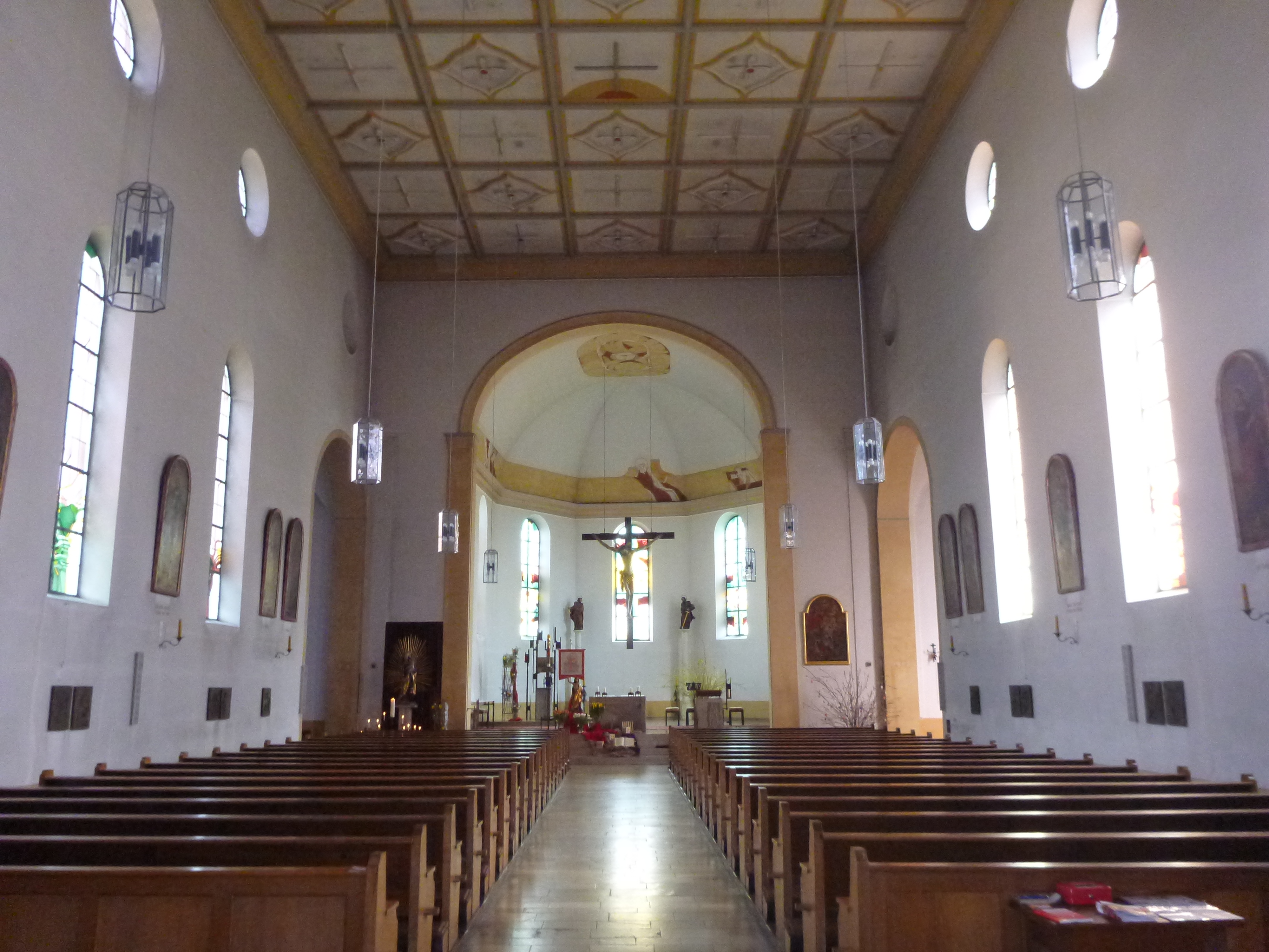 Innenraum